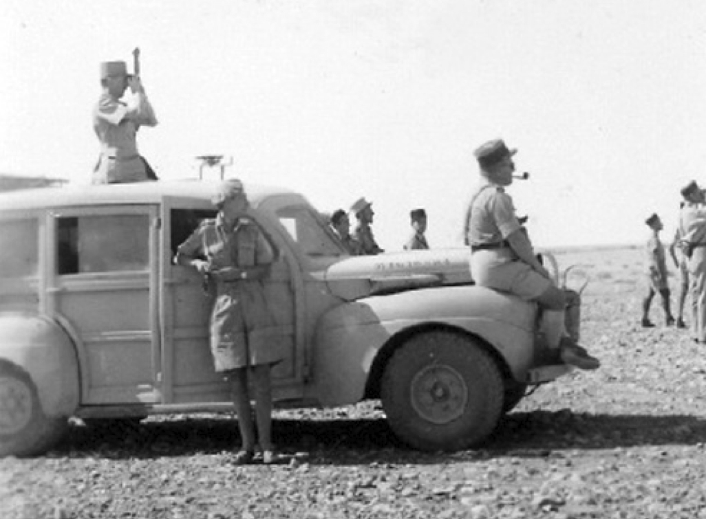 General Koenig in Bir Hacheim on his Ford Utility driven by Miss Susan Travers in May 1942